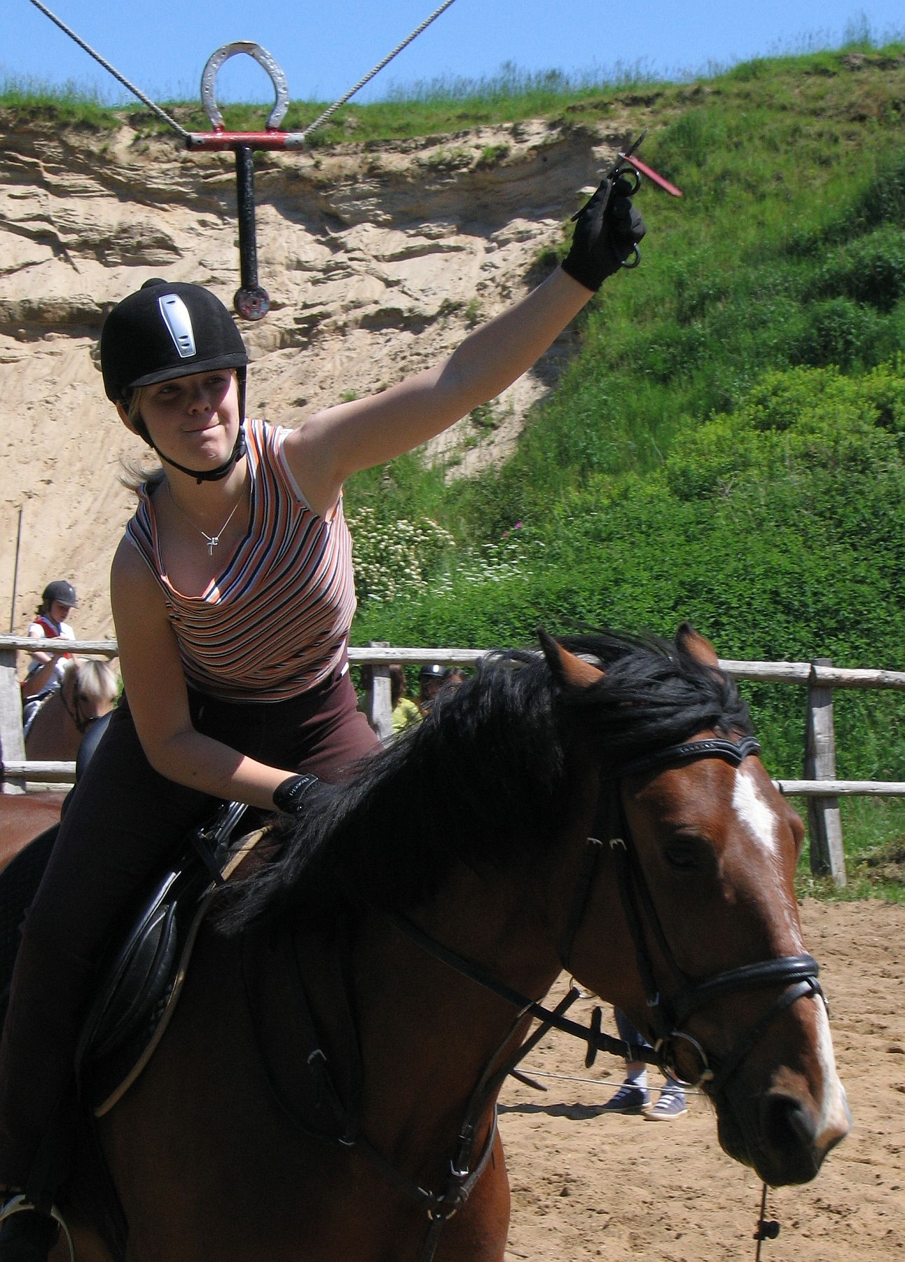 Ringreiten